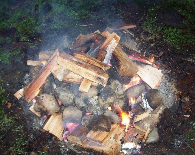 Fuego para calentar las piedras de un curanto, comida típica de Chiloé cocinada en un hoyo en la tierra.